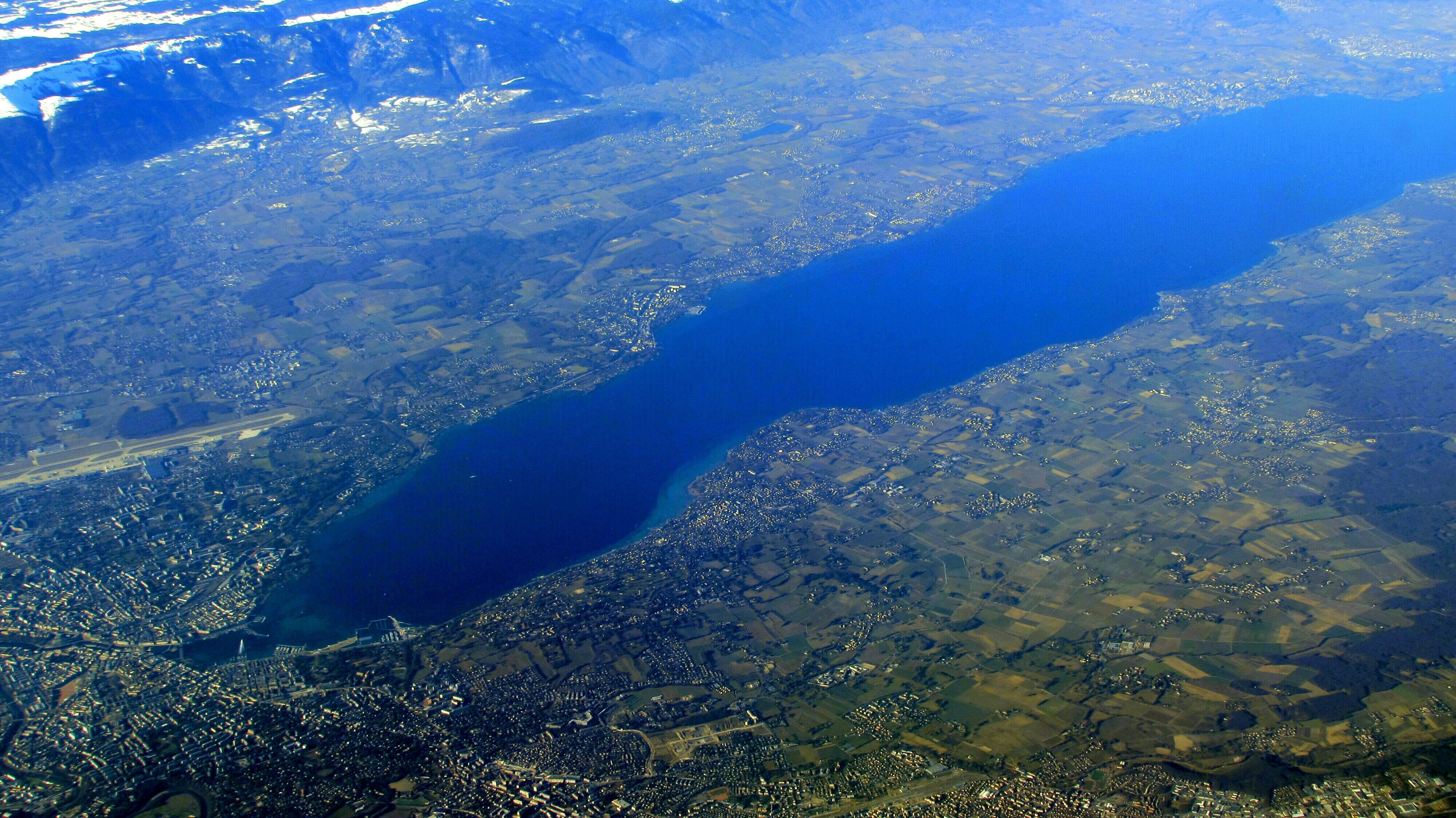 Genfersee Petit Lac 2019